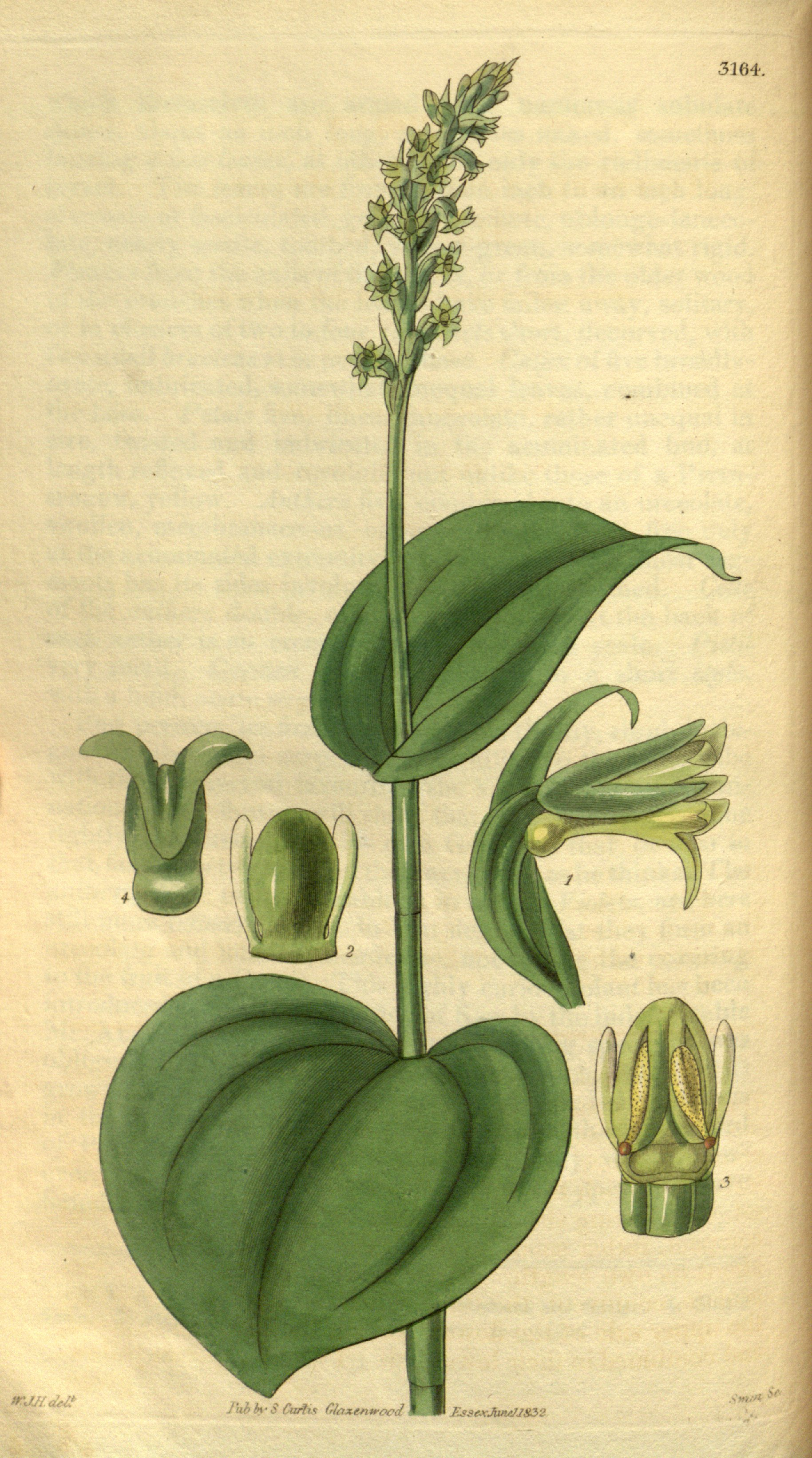 Illustration of Gennaria diphylla (as syn. Habenaria cordata)